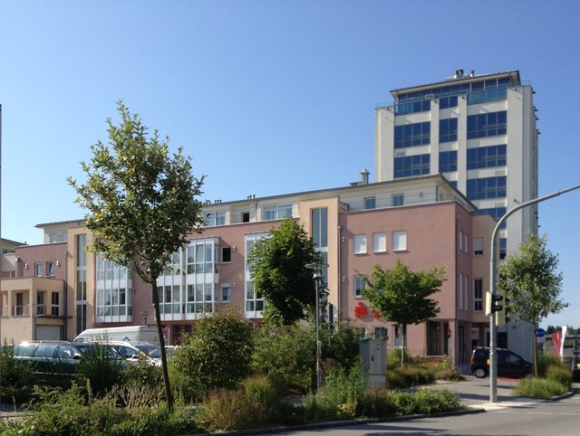 Baldham: Einkaufszentrum